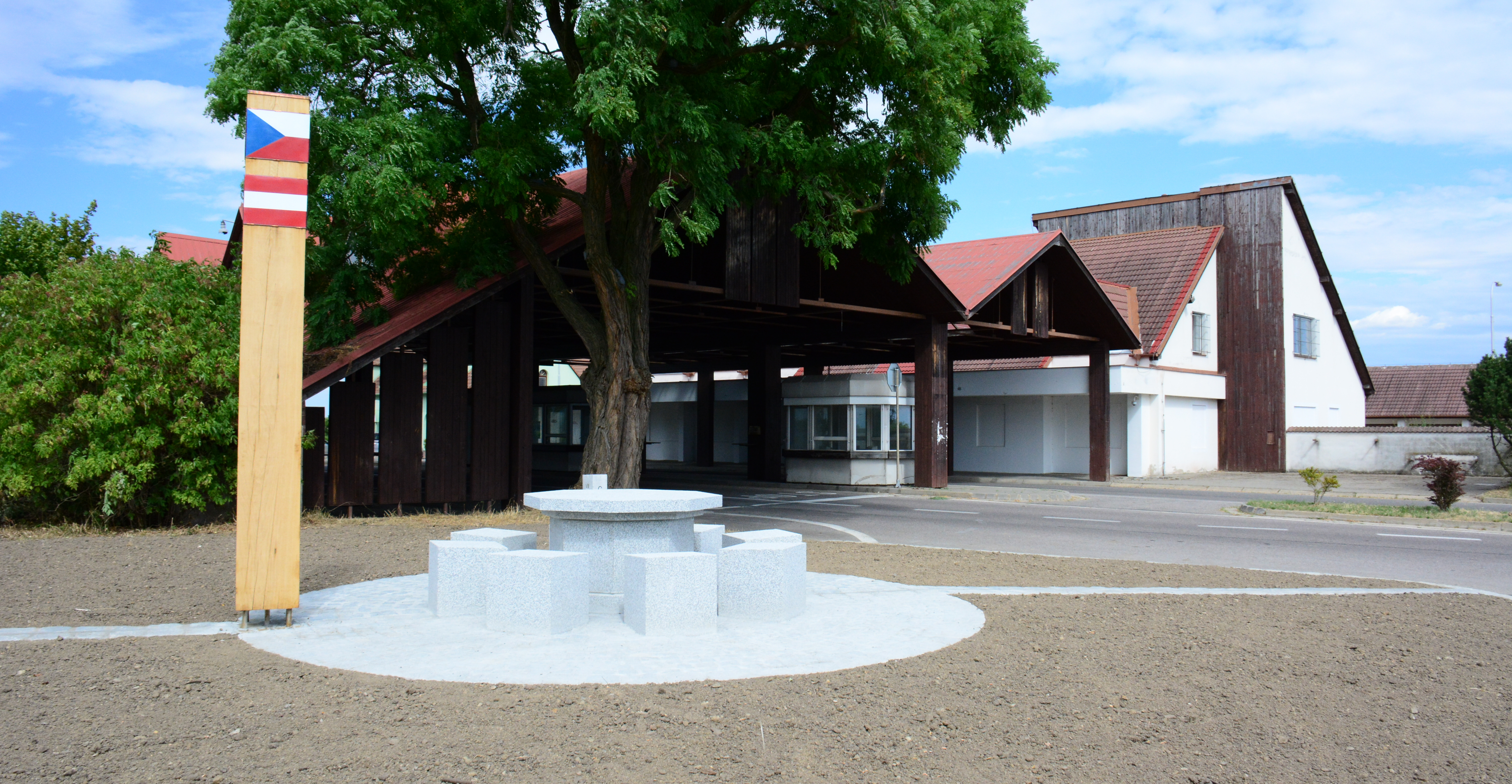 Der Grenzübergang Mitterretzbach - Hnanice / Gnadlersdorf